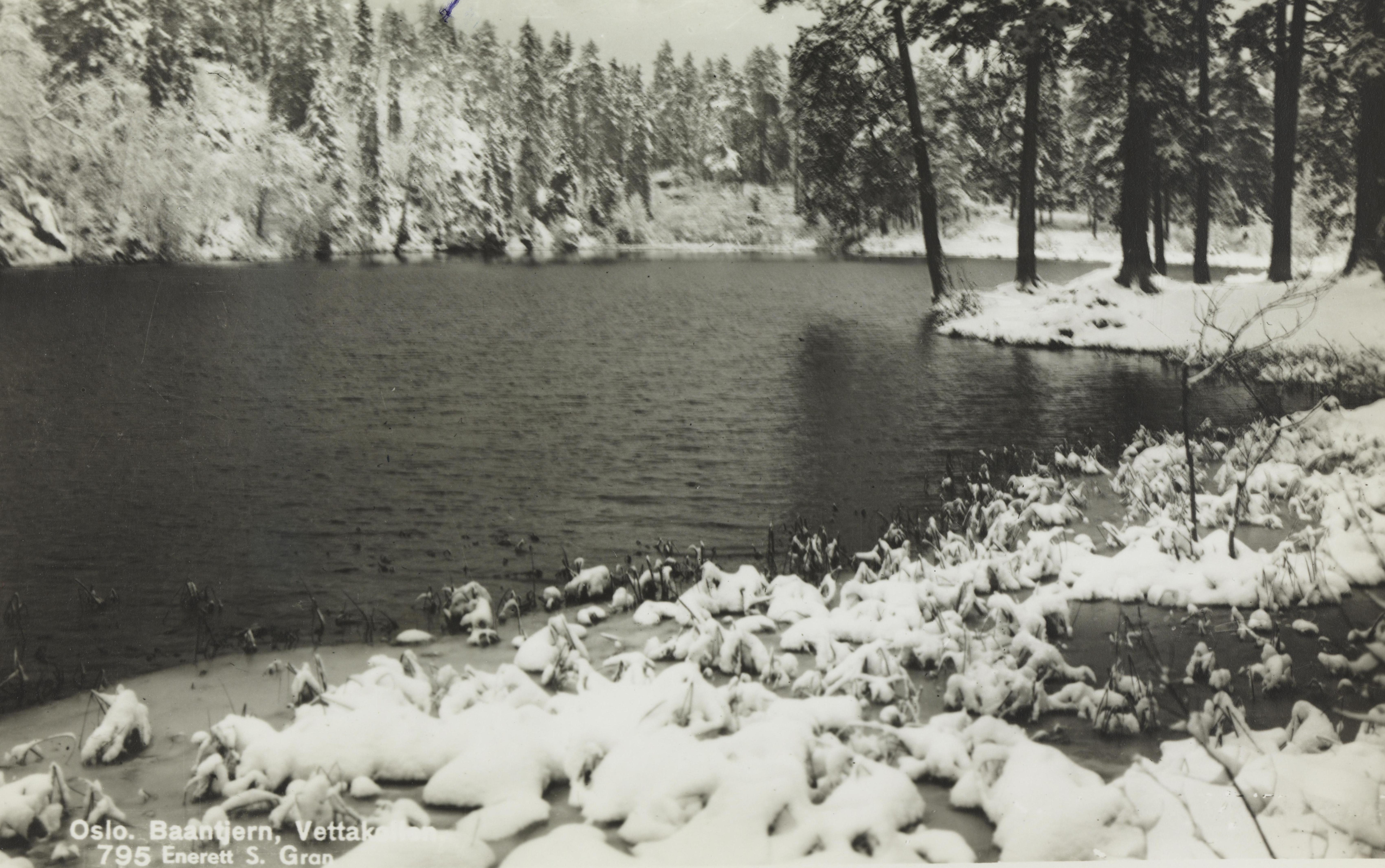 Bildet er hentet fra Nasjonalbibliotekets bildesamling Bånntjern,Vettakollen, Oslo, Oslo